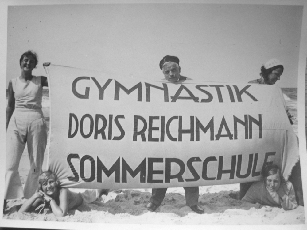 Schülerinnen und der Worpsweder Künstler Georg Tappert mit Doris Reichmann